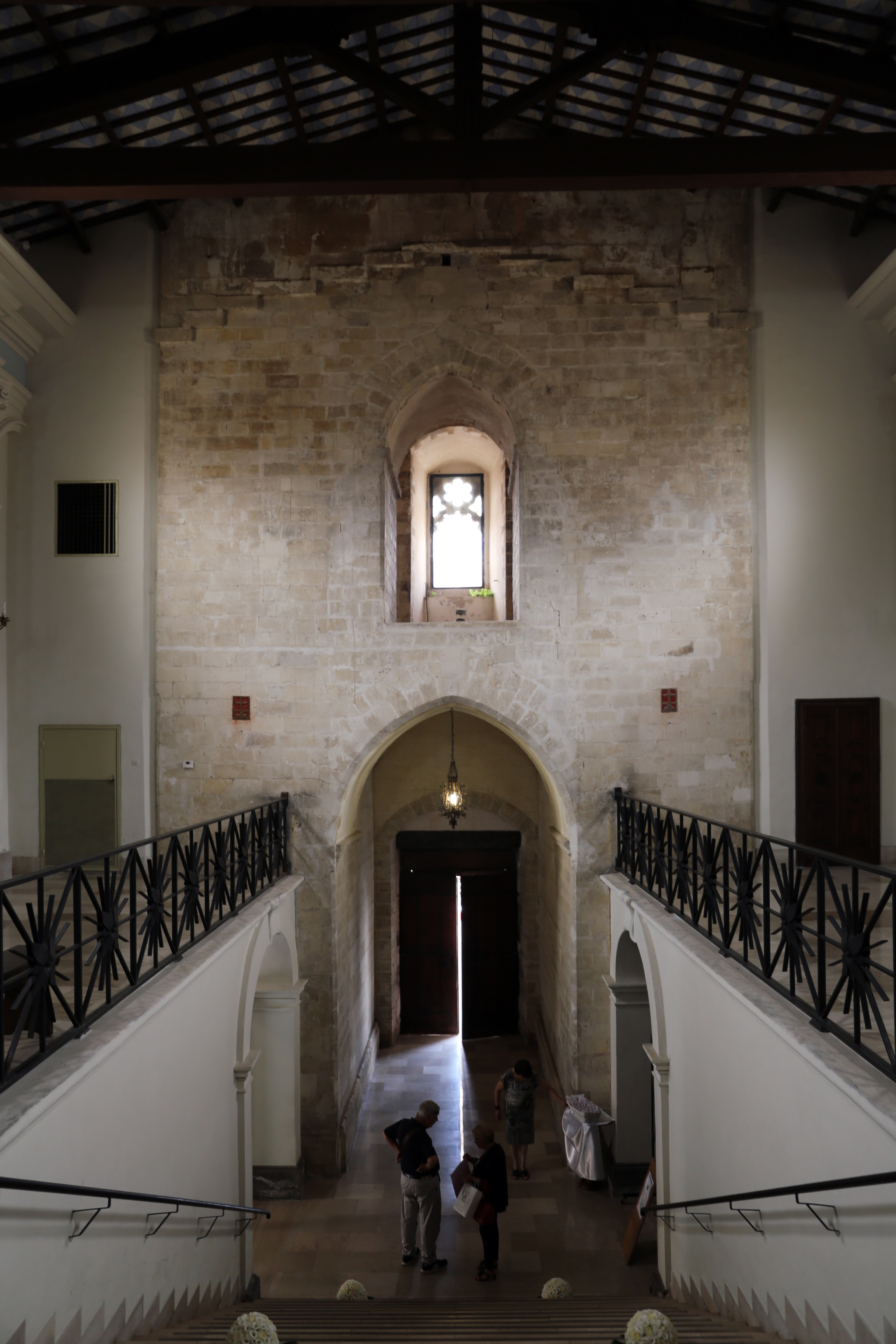 Piazza Santa Maria Maggiore This is a photo of a monument which is part of cultural heritage of Italy.